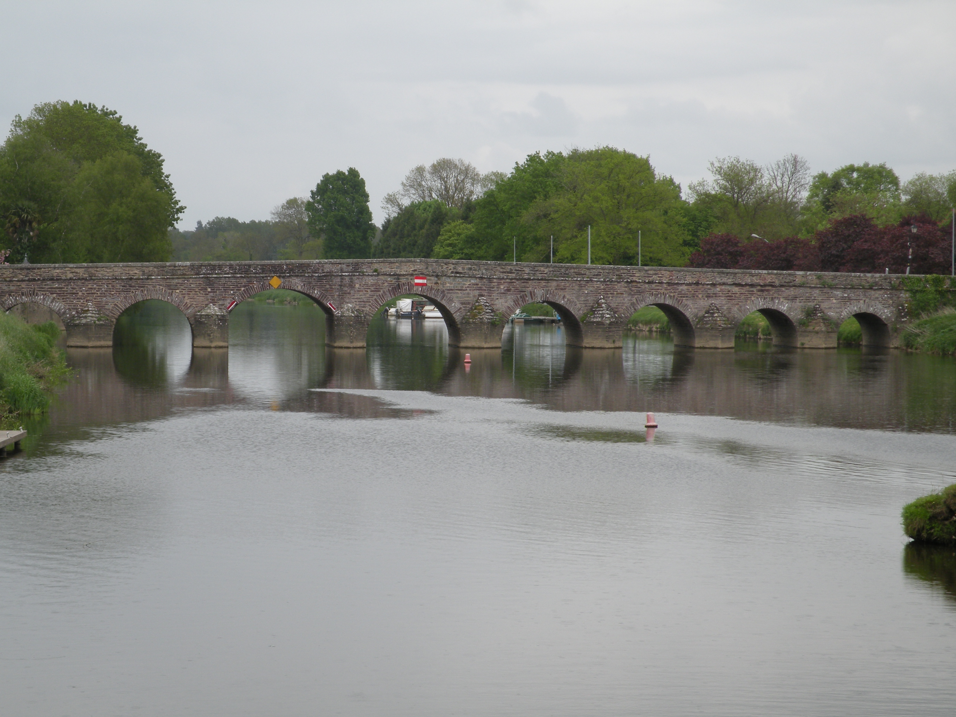 Pont de Pont-Réan sur la Vilaine, entre Bruz et Guichen.